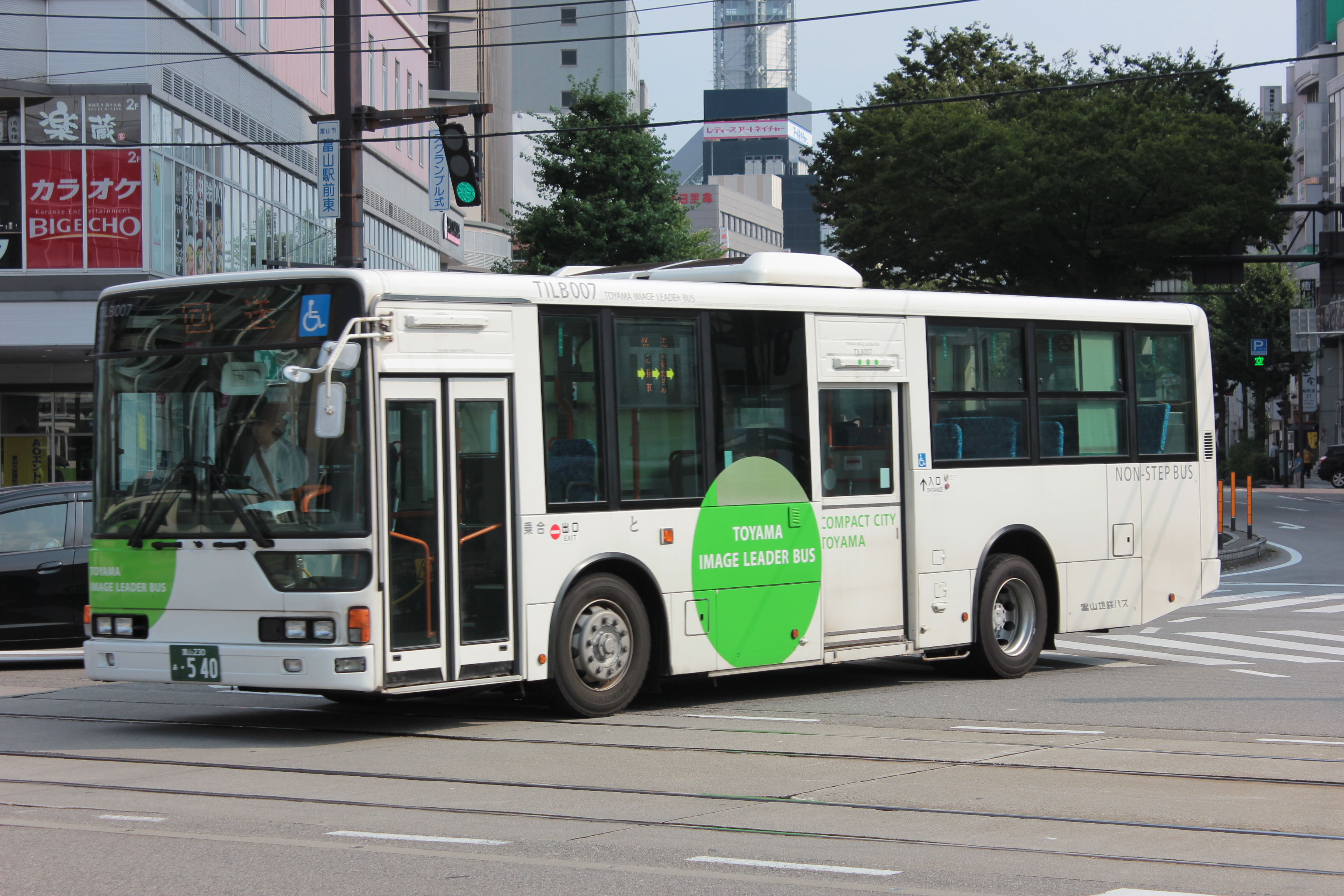 富山地方鉄道の路線バス（三菱ふそう・エアロスター、QKG-MP37FK） Canon EOS Kiss X5